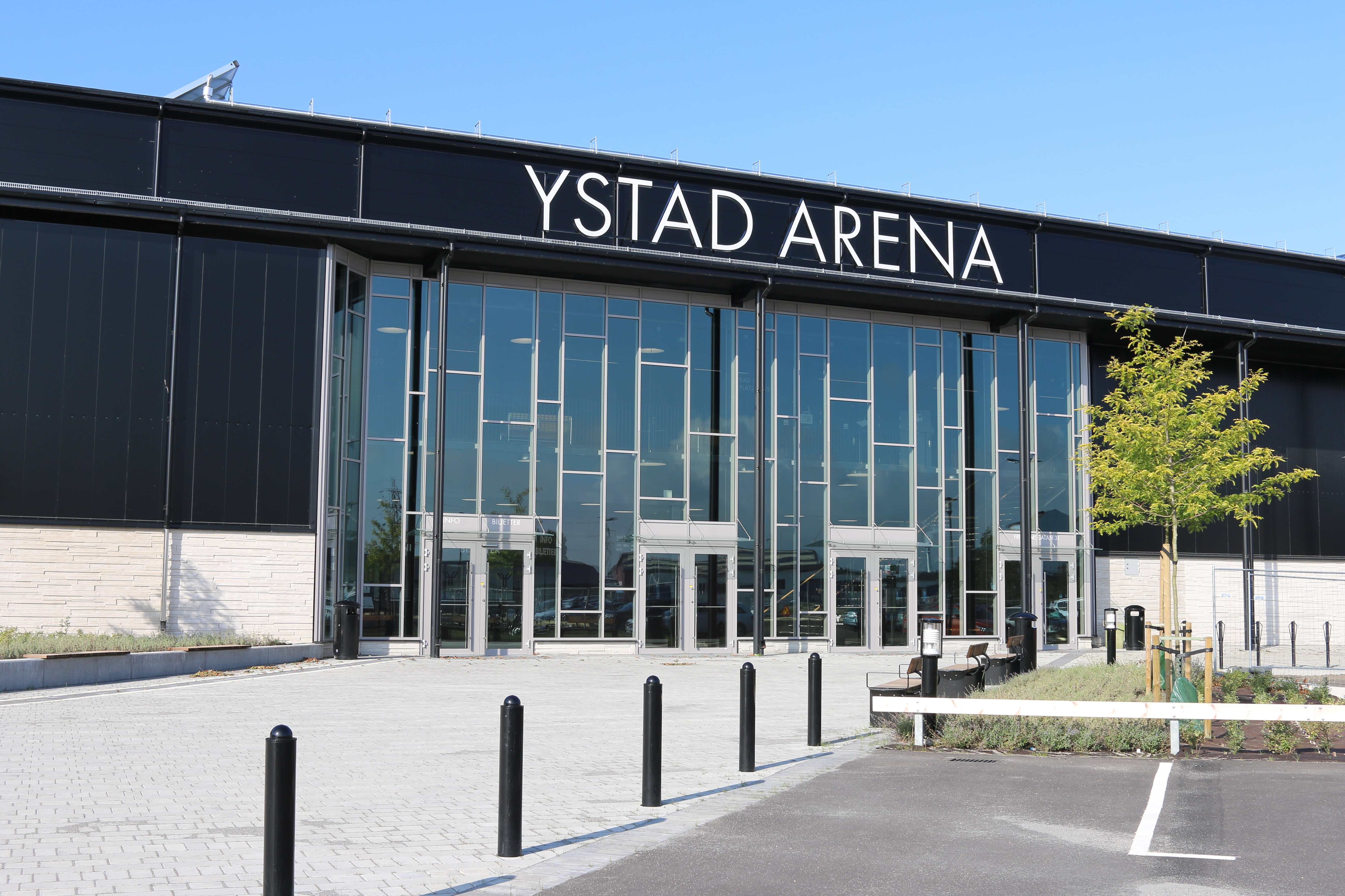 Ystads Arena 2017